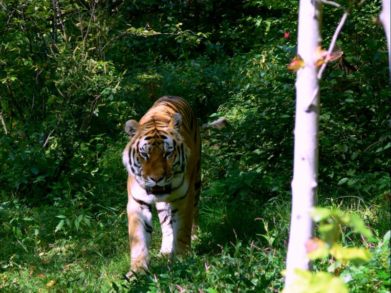 Тигр бенгальский в Карагандинском зоопарке